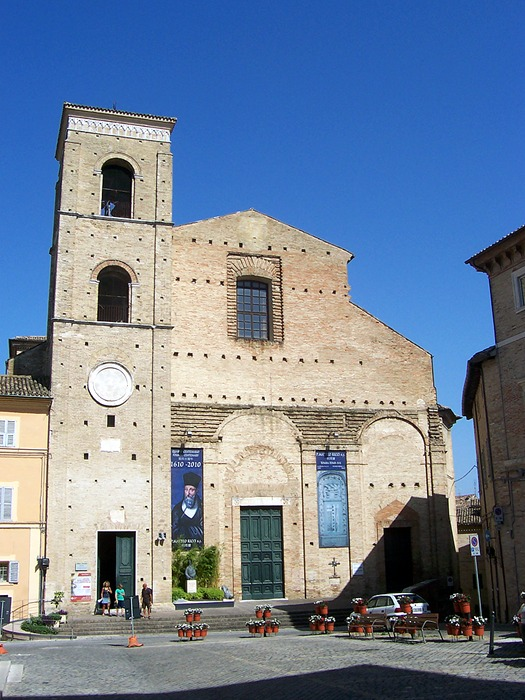 Macerata - Duomo